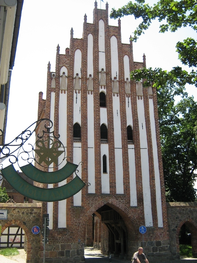 Das Stargarder Tor (Haupttor) in Neubrandenburg.